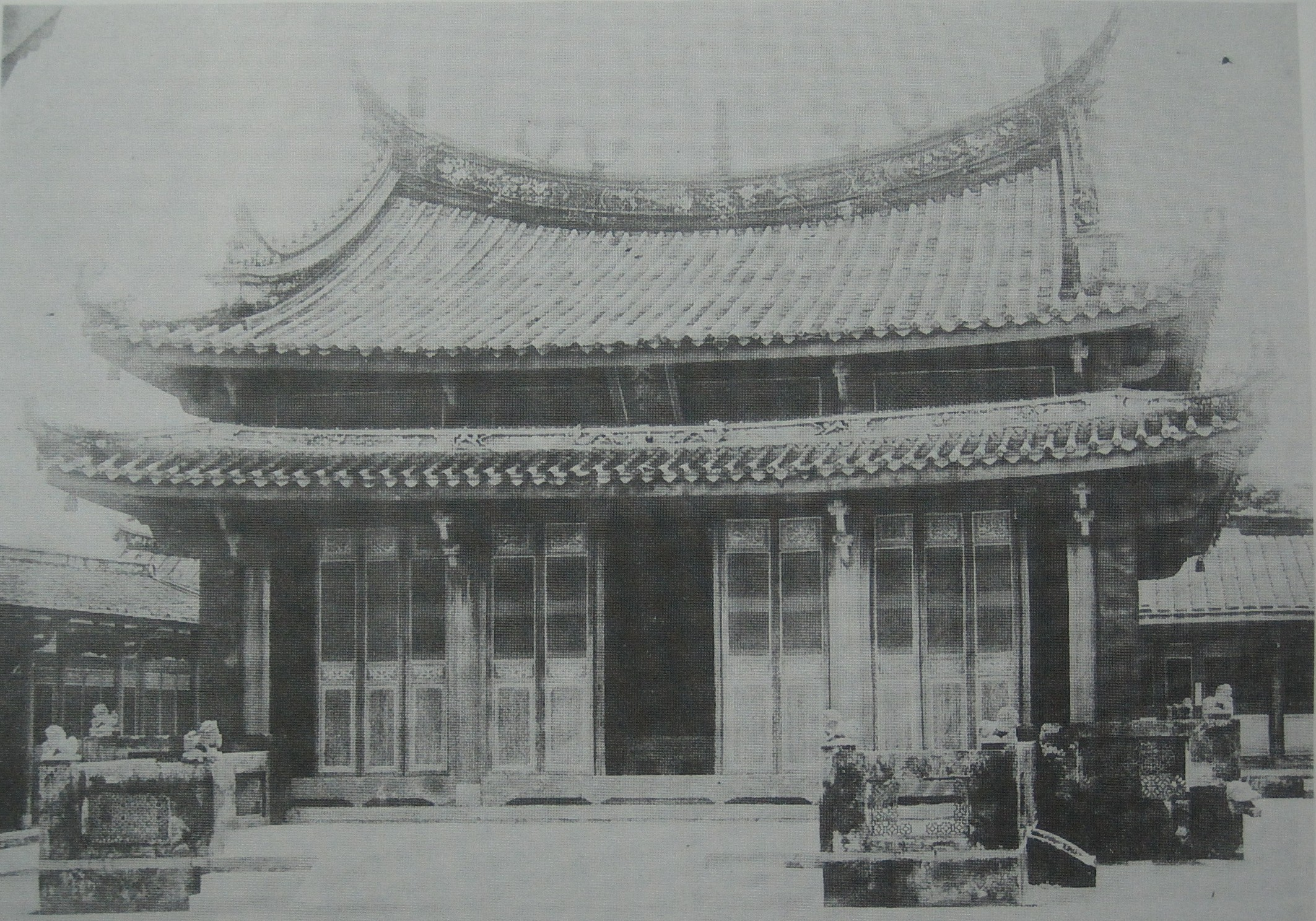 1933年前的臺南孔廟